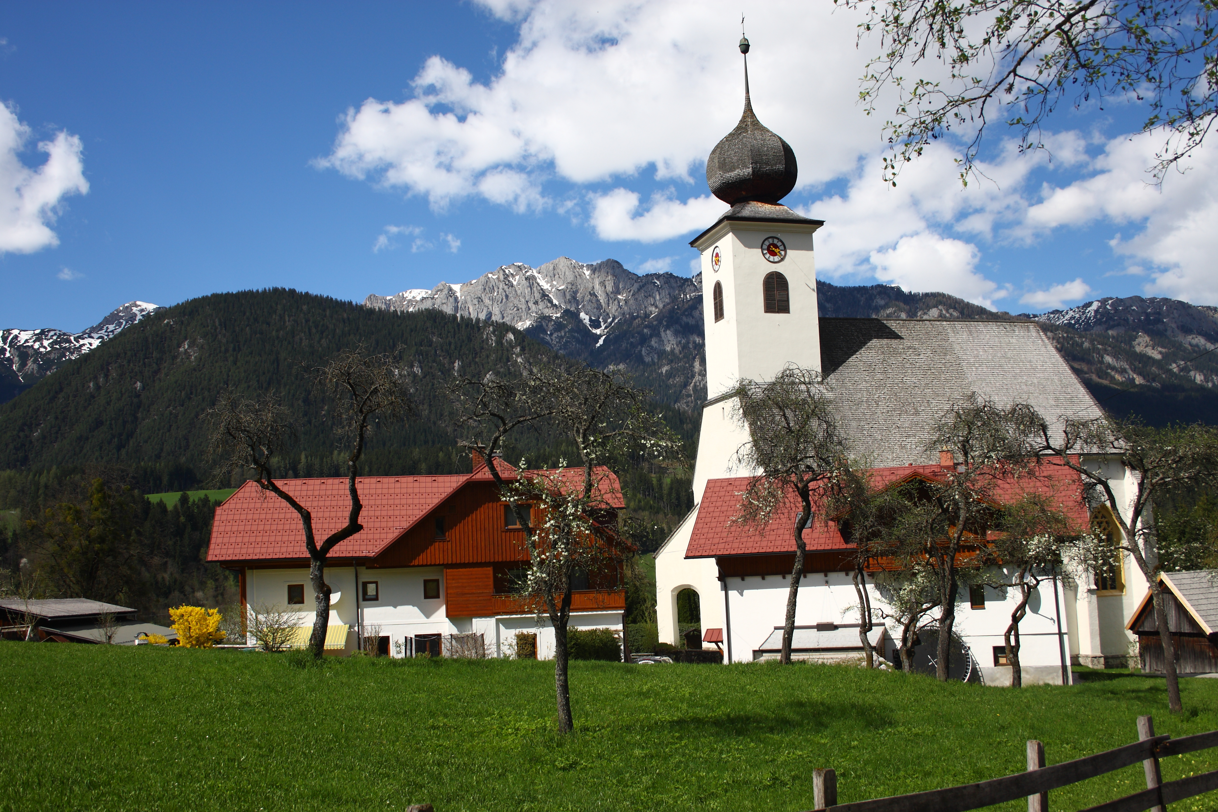 Kath. Filialkirche hl. Margaretha, Oberhaus, Steiermark Austria